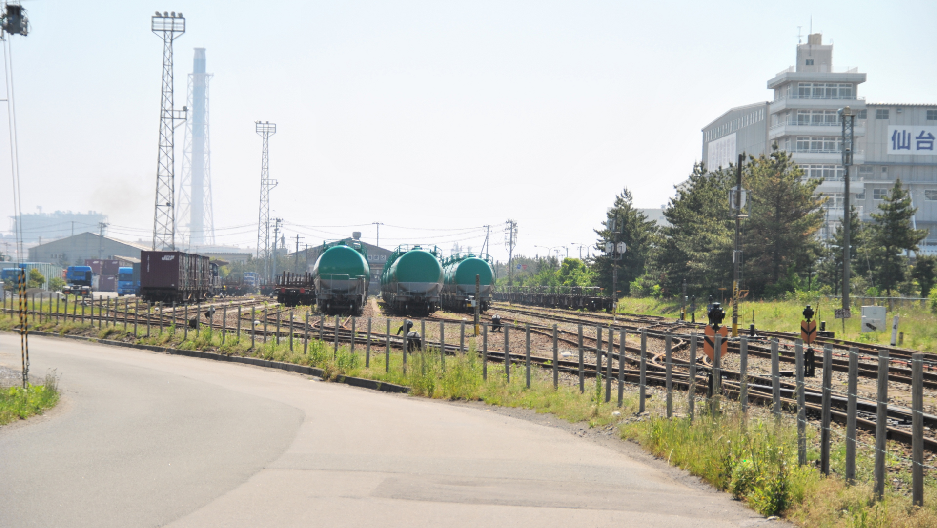 仙台港駅（構内）